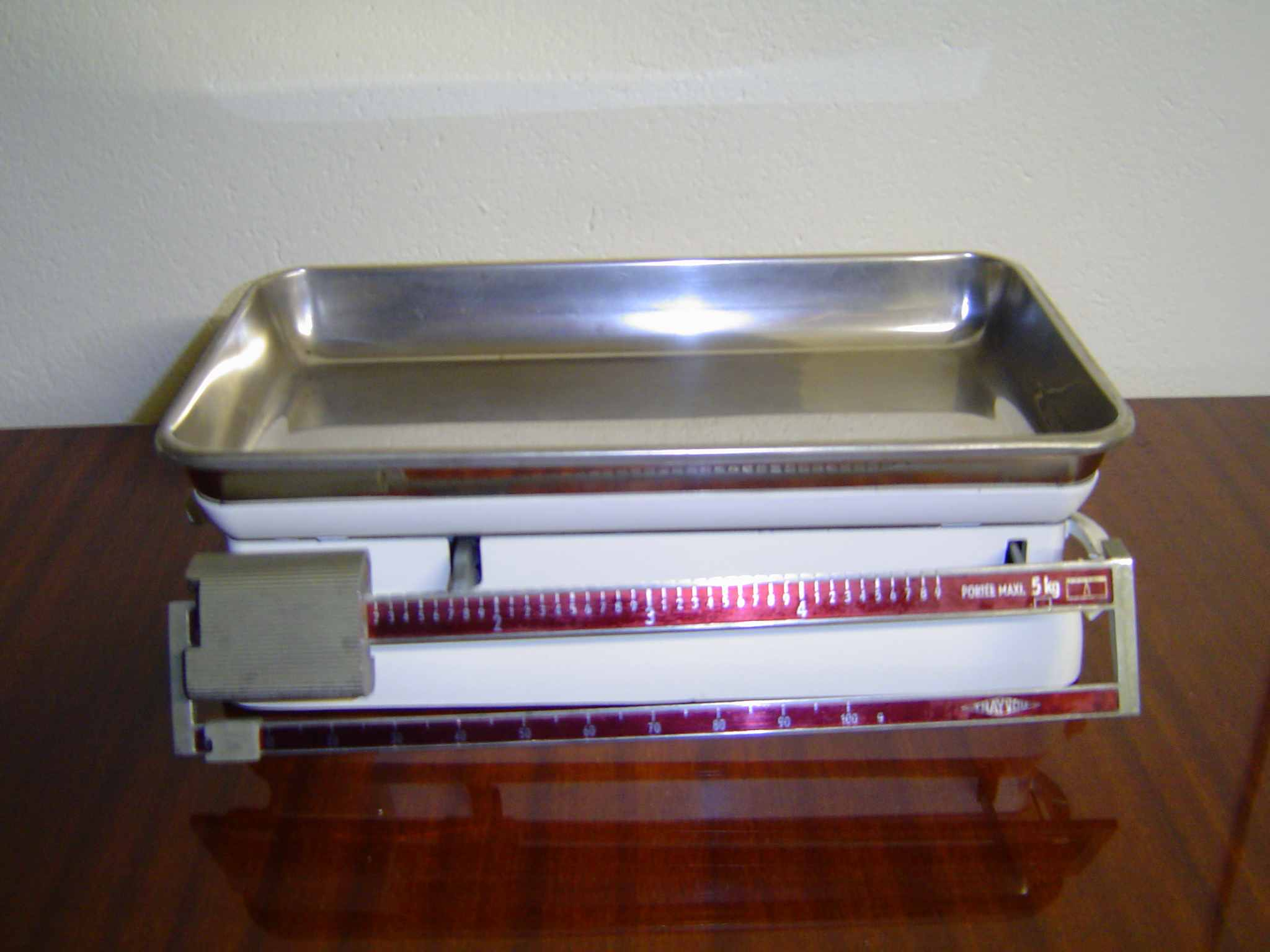 Photo personnelle de ma collection